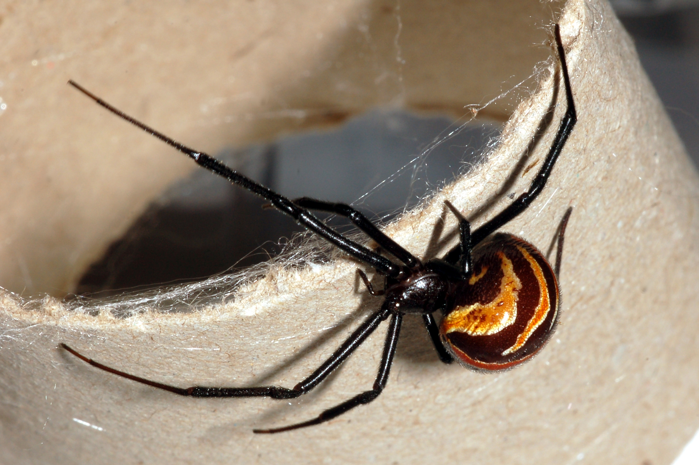 Latrodectus mactans (Fam. Theridiidae) in Gefangenschaft, Museum Wiesbaden, Deutschland